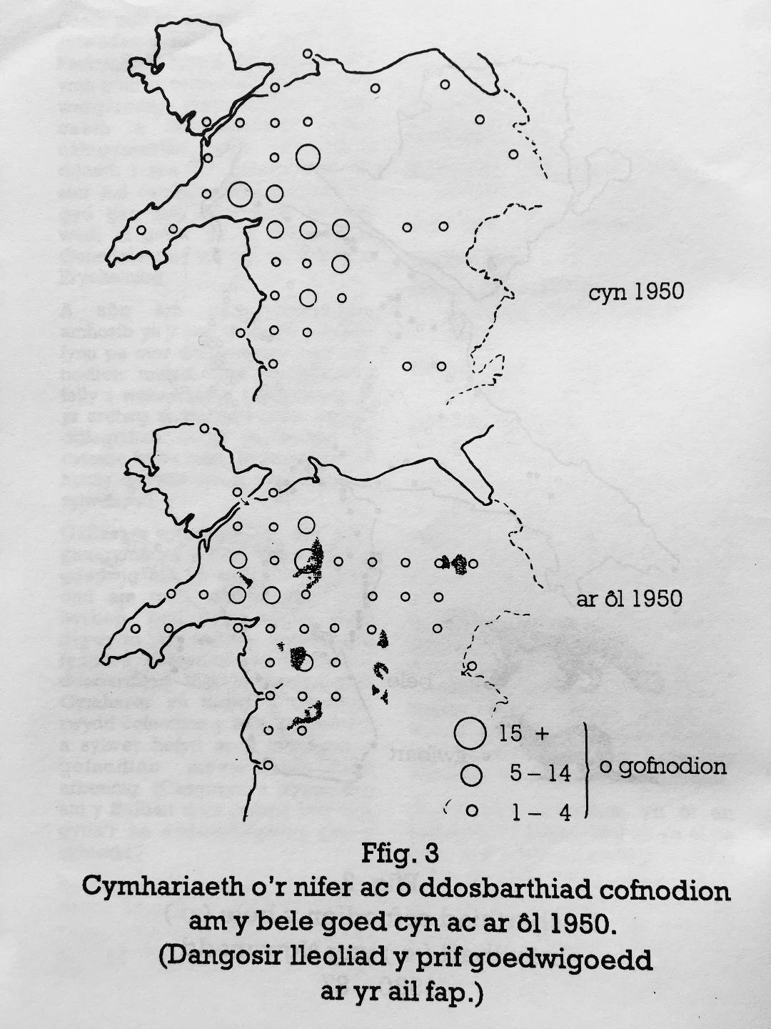 map Bele goed yn dangos lleoliadau a niferoedd cofnodion y bele yng ngogledd Cymru Arolwg 1987